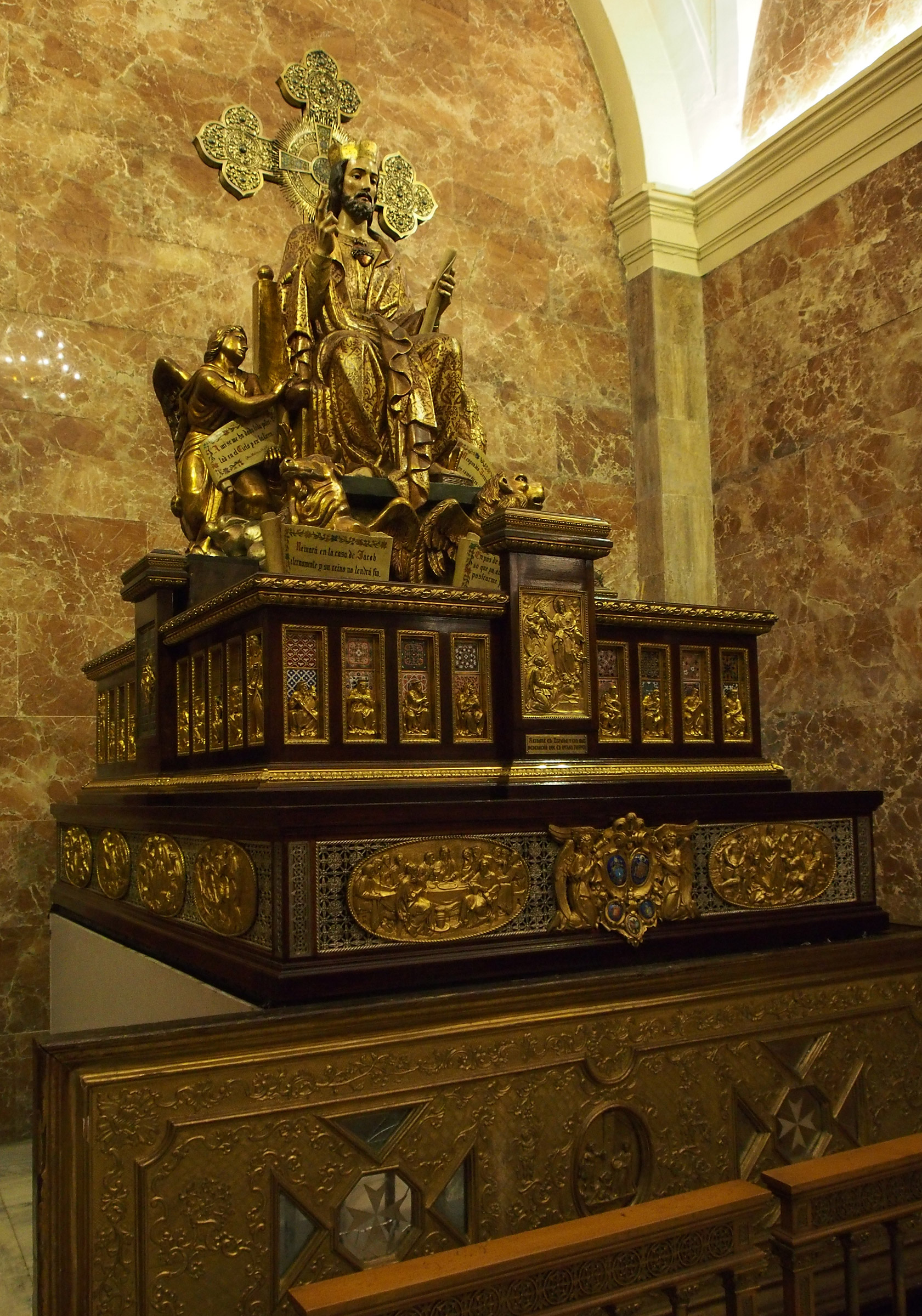 Carroza de Cristo Rey. Santuario Nacional de la Gran Promesa, Valladolid.